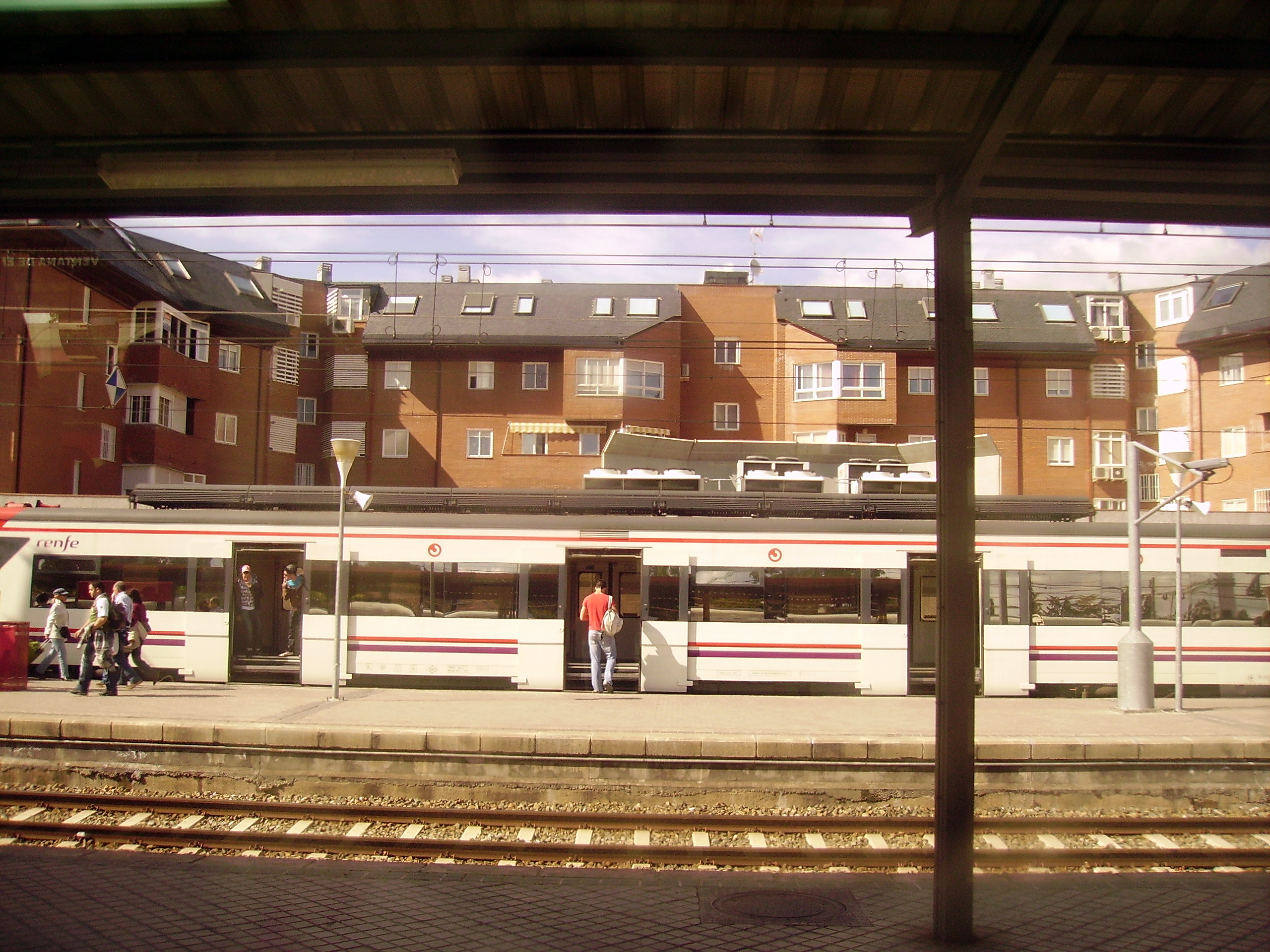 Estación de Cercanías de Collado - Villalba